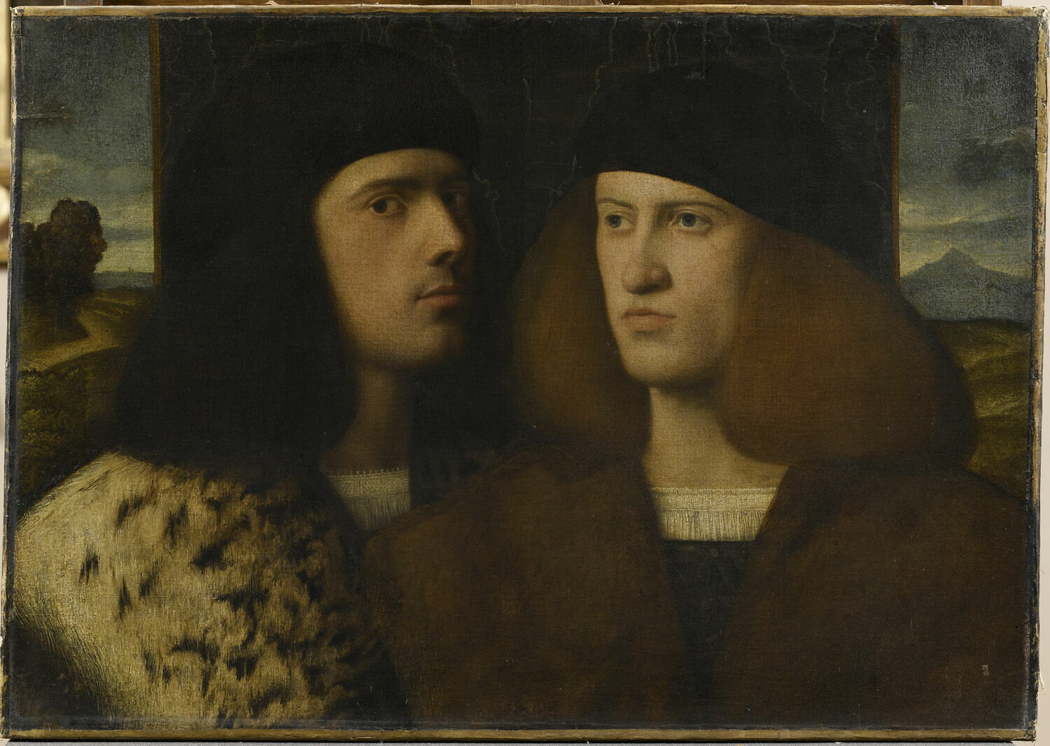 Portrait de deux jeunes hommes